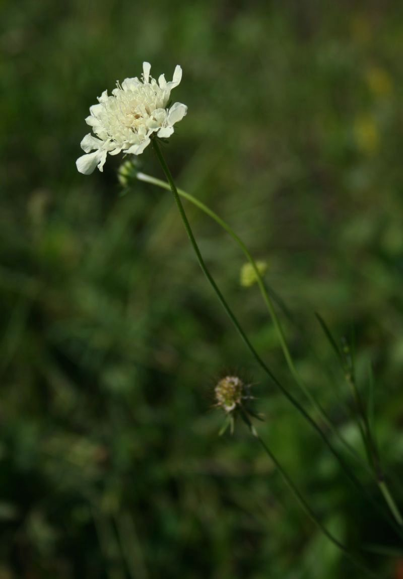 Gelbe Skabiose (Scabiosa ochroleuca), Kardengewächse (Dipsacaceae) - Österreich/Austria/Autriche: Niederösterreich, Alpenostrand, Südostfuß des Pfaffstättner Kogels NW Pfaffstätten, ca. 350 m s.m.